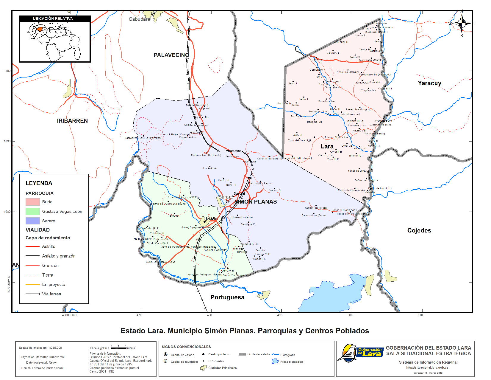 dpt-simón plana